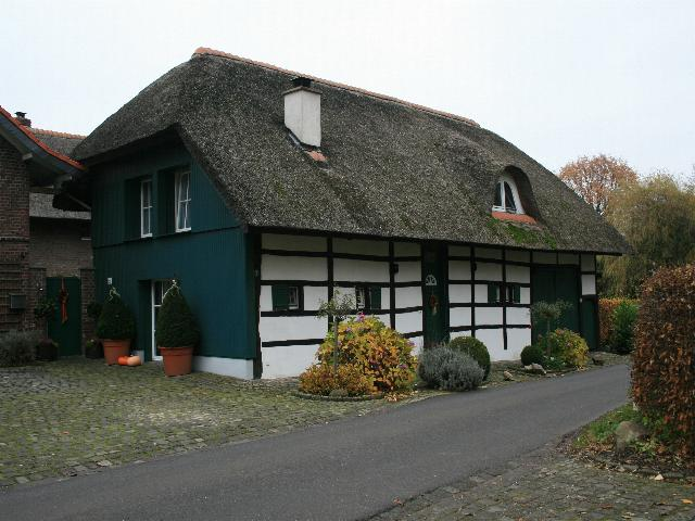 Fachwerkhaus in Wegberg-Harbeck